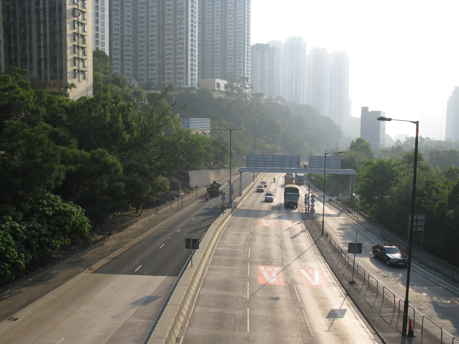 將軍澳道 Tseung Kwan O Road